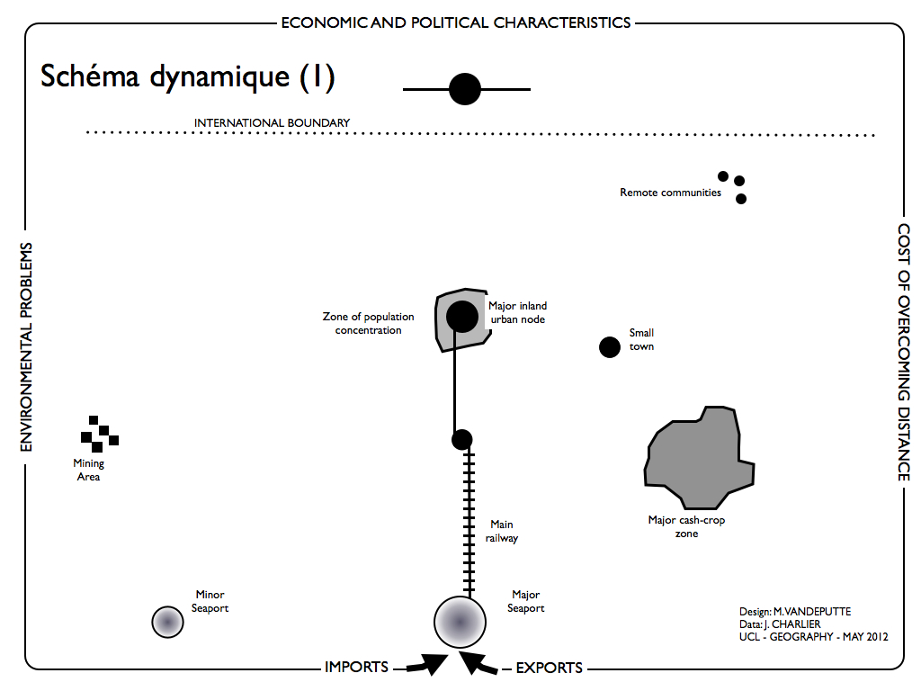 Schéma de développement d'un réseau de transport en Afrique Centrale